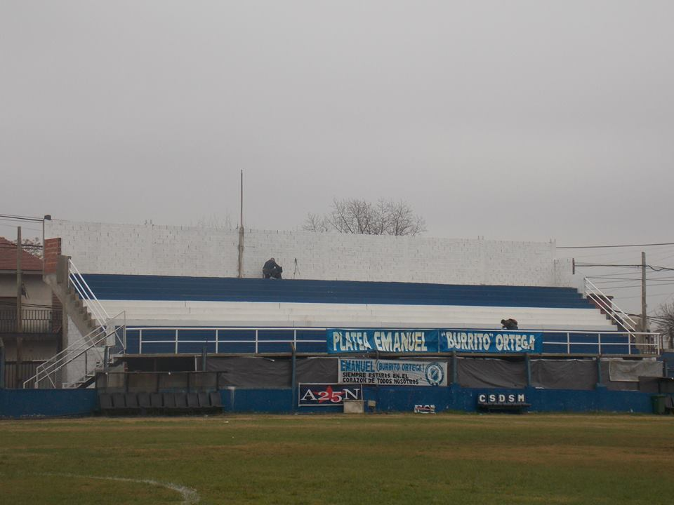 Platea Emanuel Ortega, del Estadio Francisco Boga, de San Martin de Burzaco.